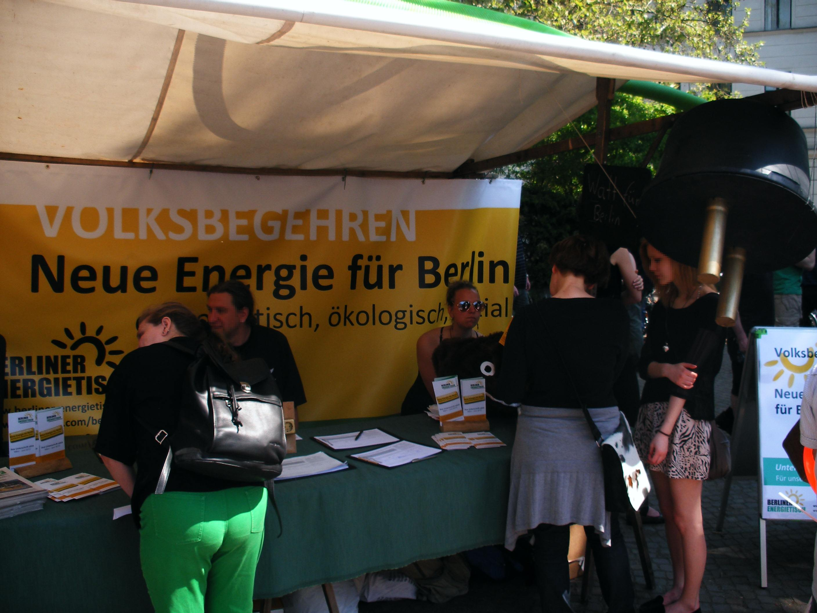 Der Berliner Energietisch und die Kampagne Freiheit statt Angst sammeln auf dem MyFest 2012 Unterschriften für das Volksbegehren Neue Energie für Berlin.